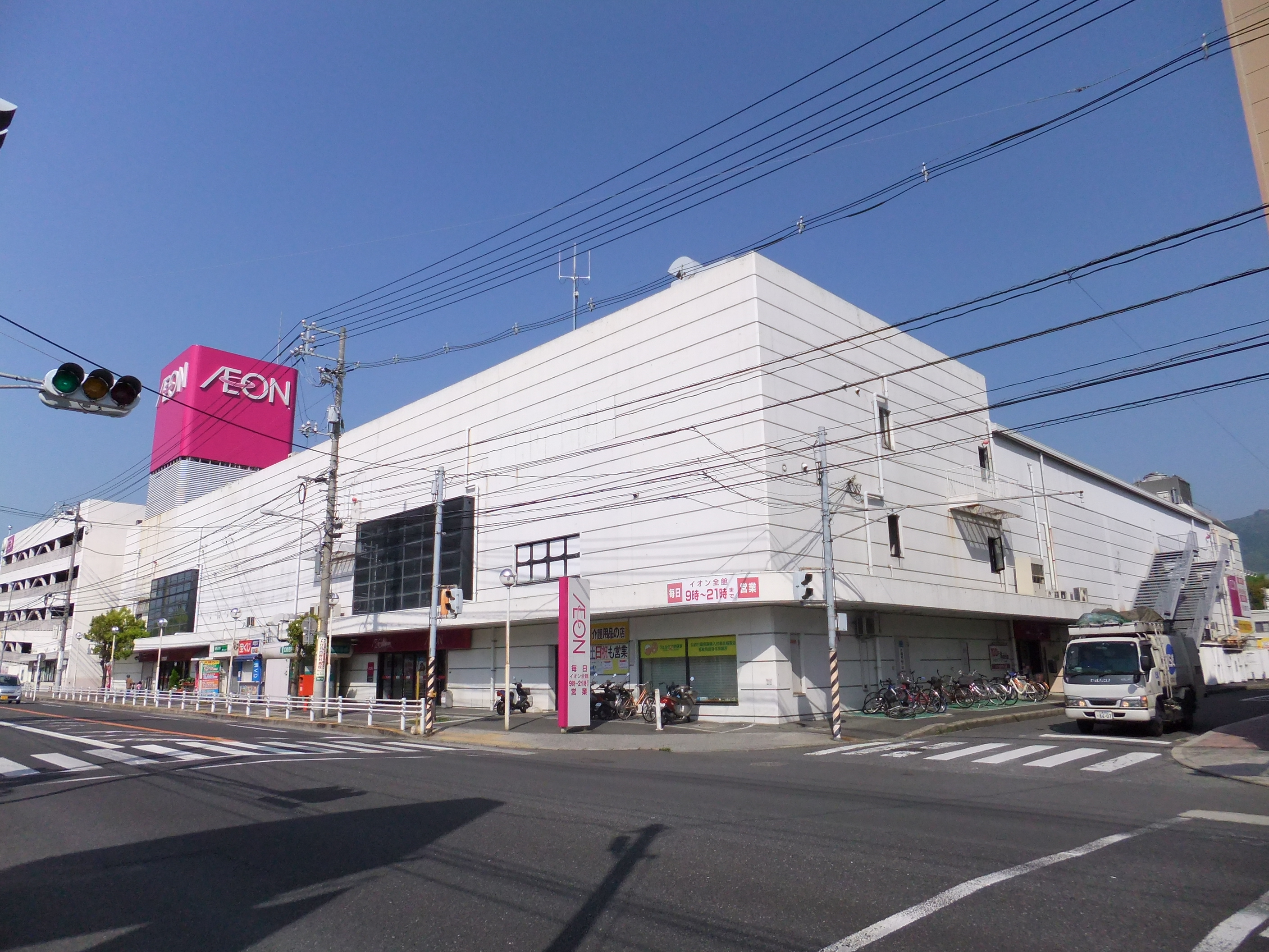 イオン廿日市店